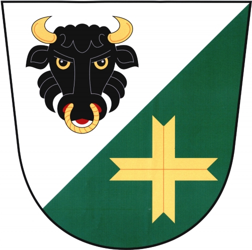 znak, Číhalín, okres Třebíč